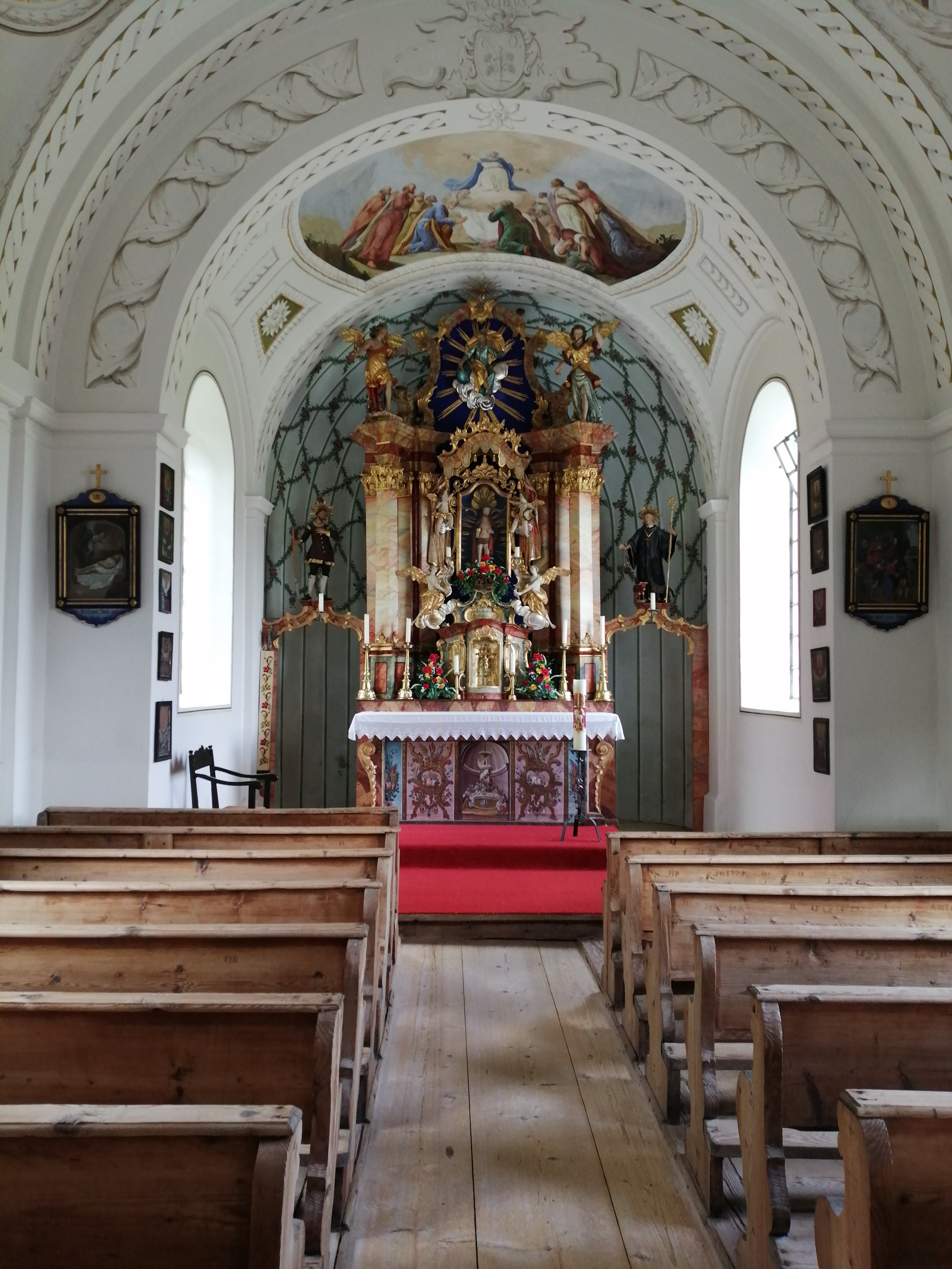 Innenansicht der Wallfahrtskapelle Unser Herr im Elend, Bärnstattkapelle